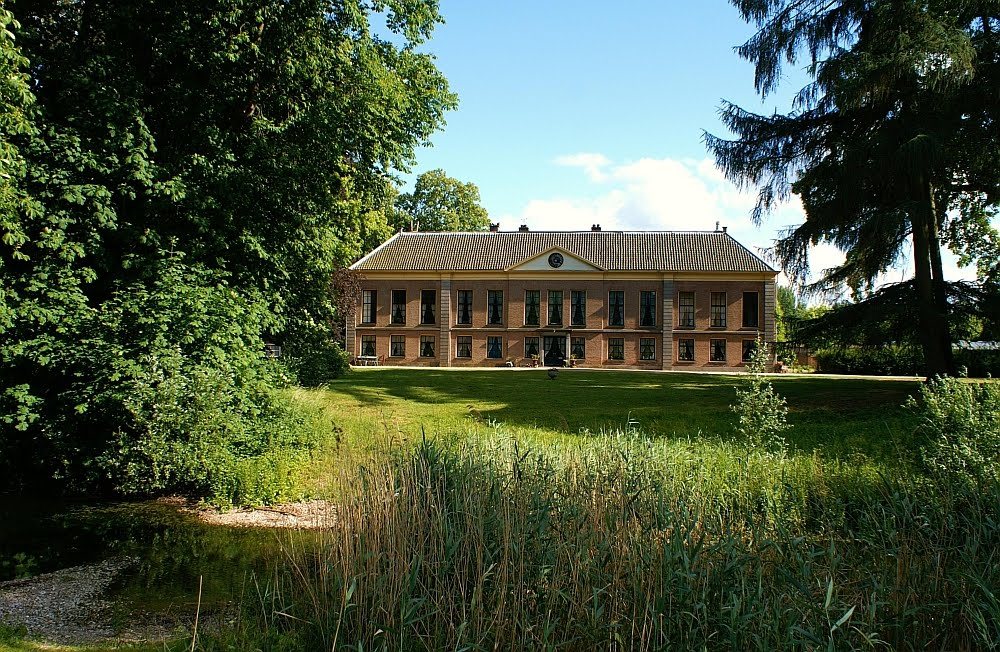 Huize Mariënwaerdt te Beesd.